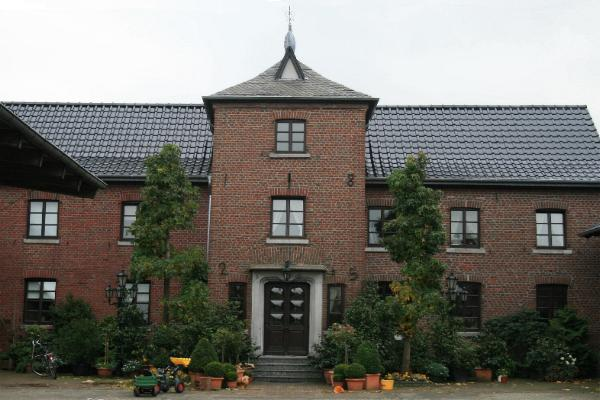 Wohnhaus Axerhof in Wegberg-Beeck